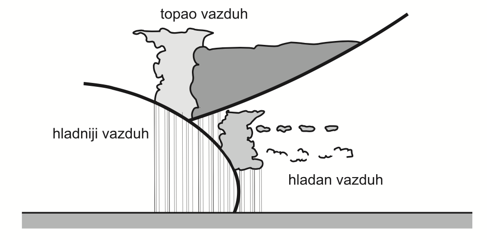 Српски (ћирилица): Хладни фронт оклузије